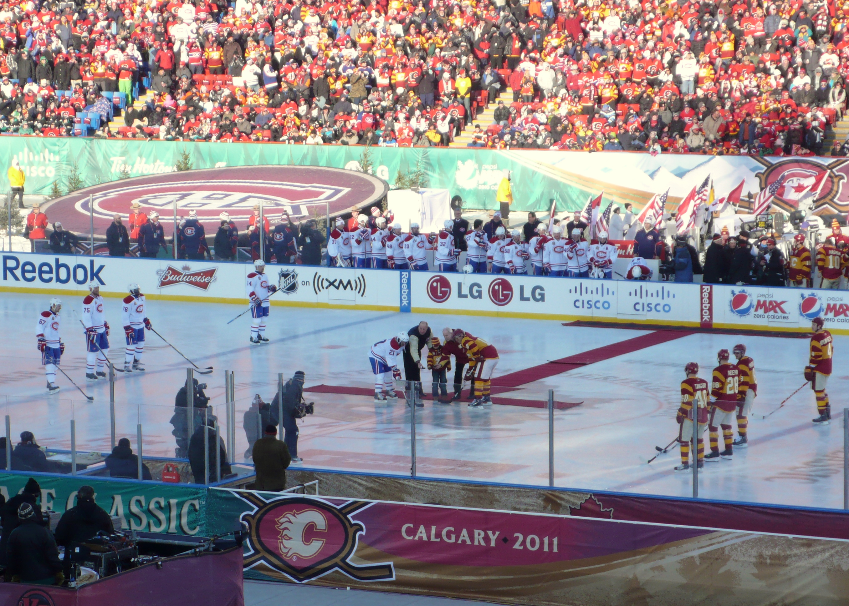 puck drop